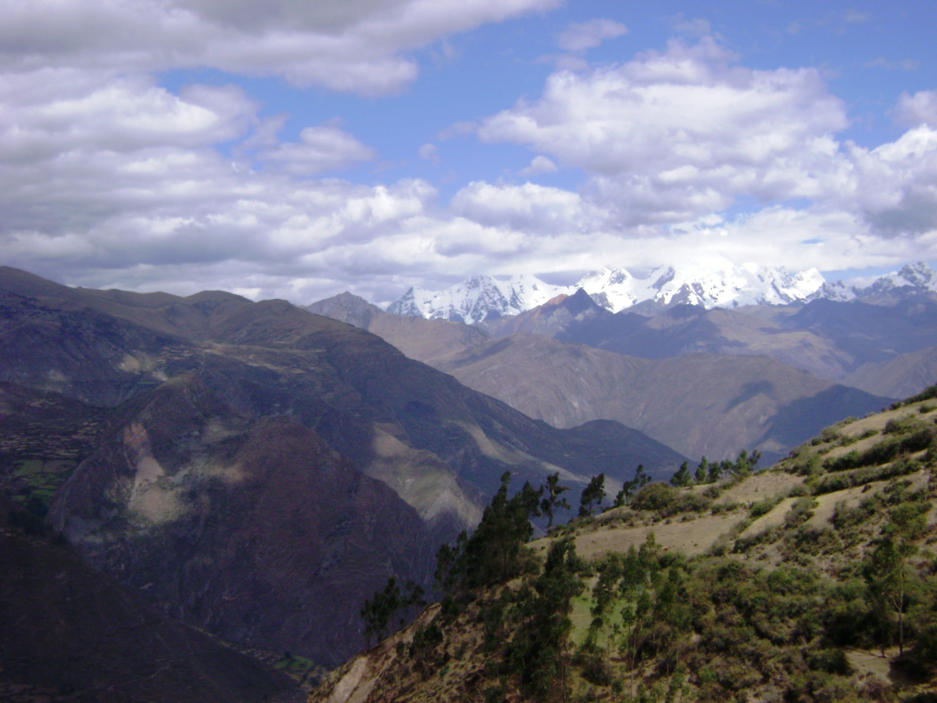 Paisaje del distrito de Chiquián en la ruta a la ciudad del mismo nombre. Obsérvese la cordillera del Huaihuash. Provincia de Bolognesi. Ancash - Perú.